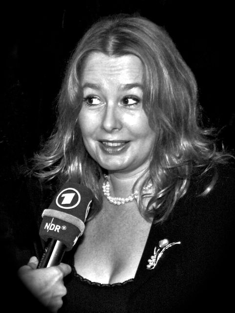 Åsa Linderborg på Svenska Akademien 6 oktober 2011, i samband med tillkännagivandet av nobelpriset i litteratur.